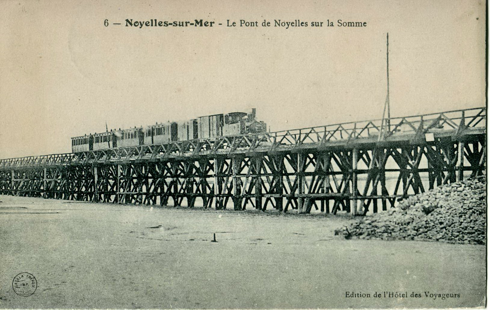 Carte postale ancienne éditée par L'Hôtel des Voyageurs, N°6Noyelles-sur-Mer (Somme) : Le Pont de Noyelles sur la SommeIl s'agit de l'estacade en bois qui traversait la Baie de la Somme de 1856 à 1912 pour supporter la ligne de chemin de fer reliant Noyelles à Saint-Valery, pour la Compagnie du nord et les Chemins de fer départementaux de la Somme